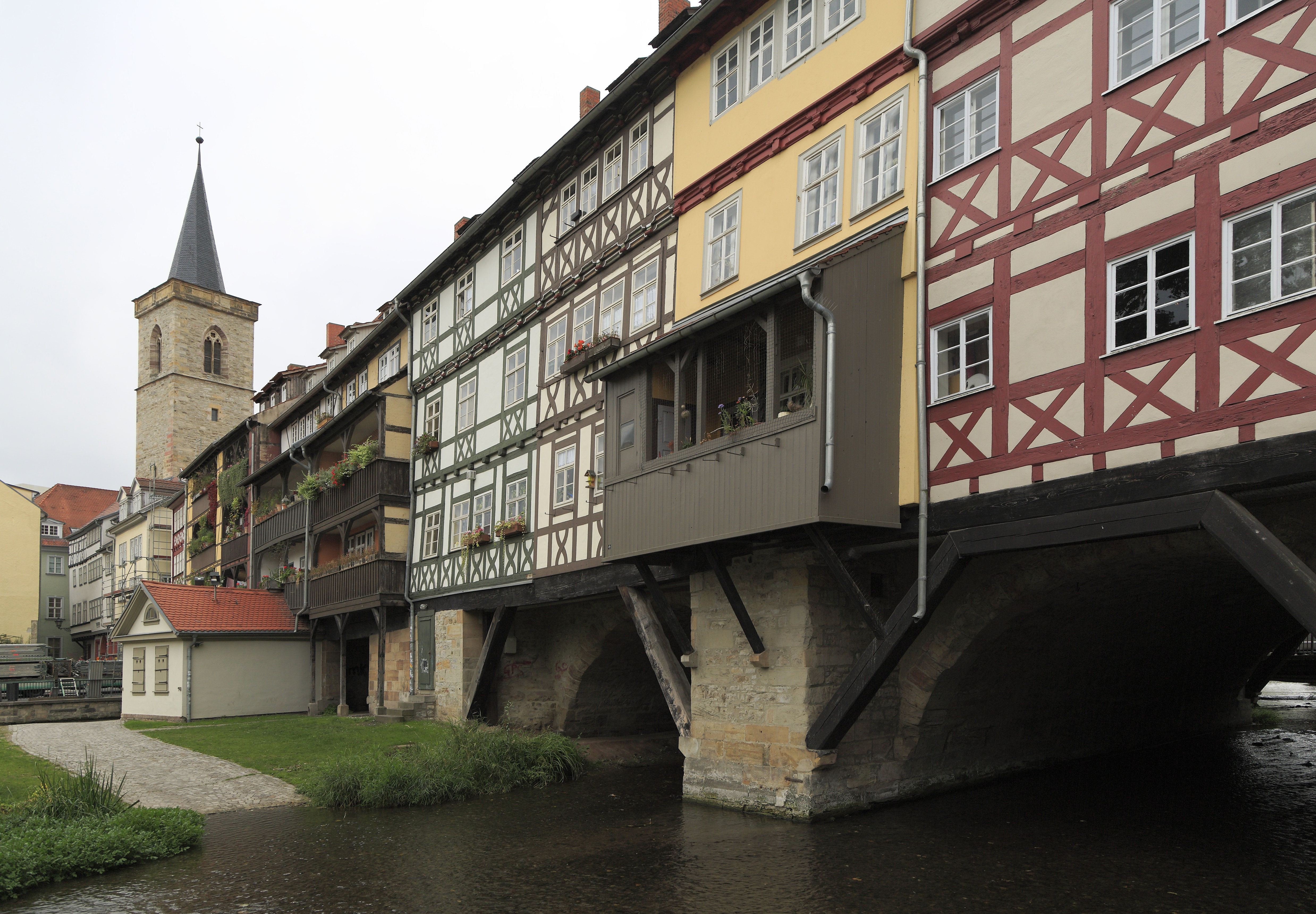 Nordseite, Krämerbrücke 4 bis 15. Das Haus auf dem Pfeiler mit dem braunen Holzbalkon ist Krämerbrücke 5, »Spielberg und Rosenkranz«. Im Hintergrund der Turm der Ägidienkirche.